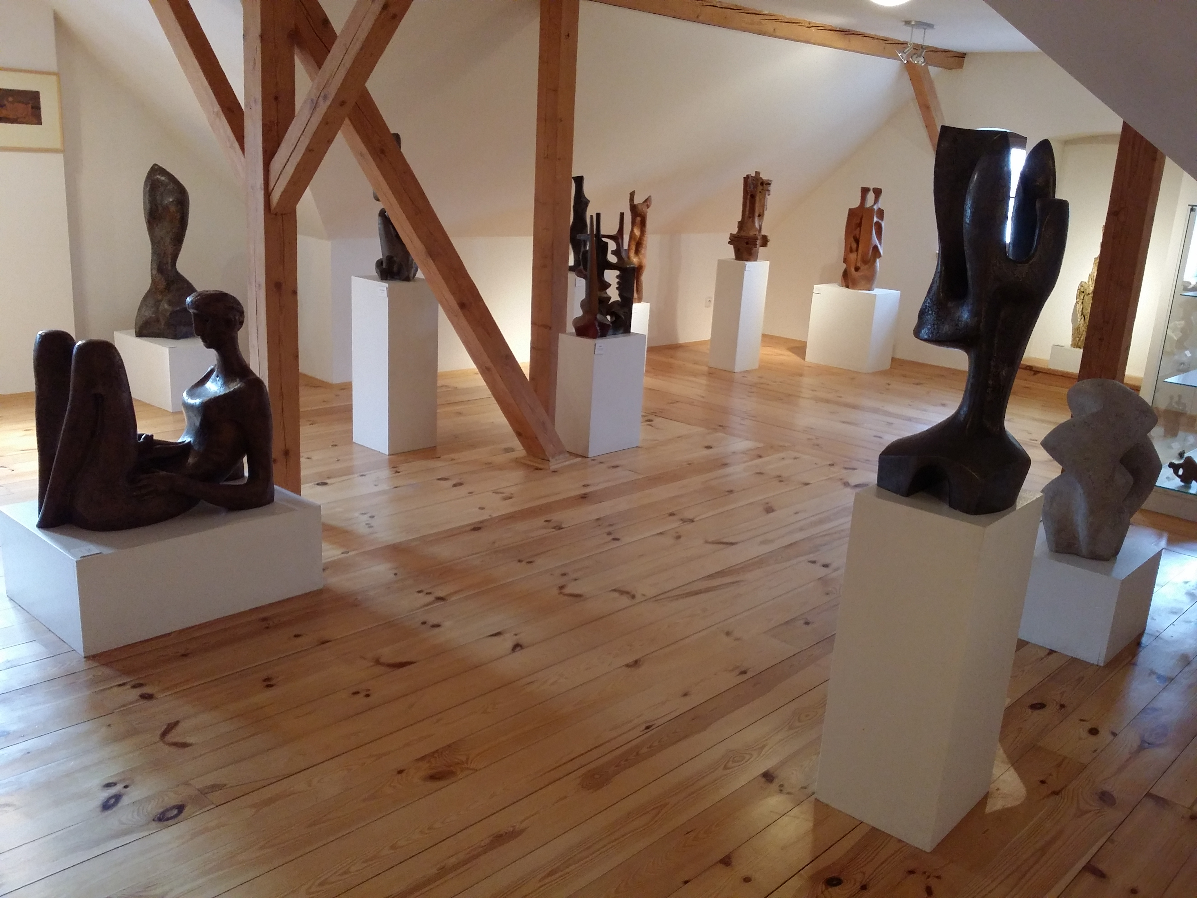 Expozice s díly Viktora Dobrovolného v jeho rodišti Havlíčkově Borové.